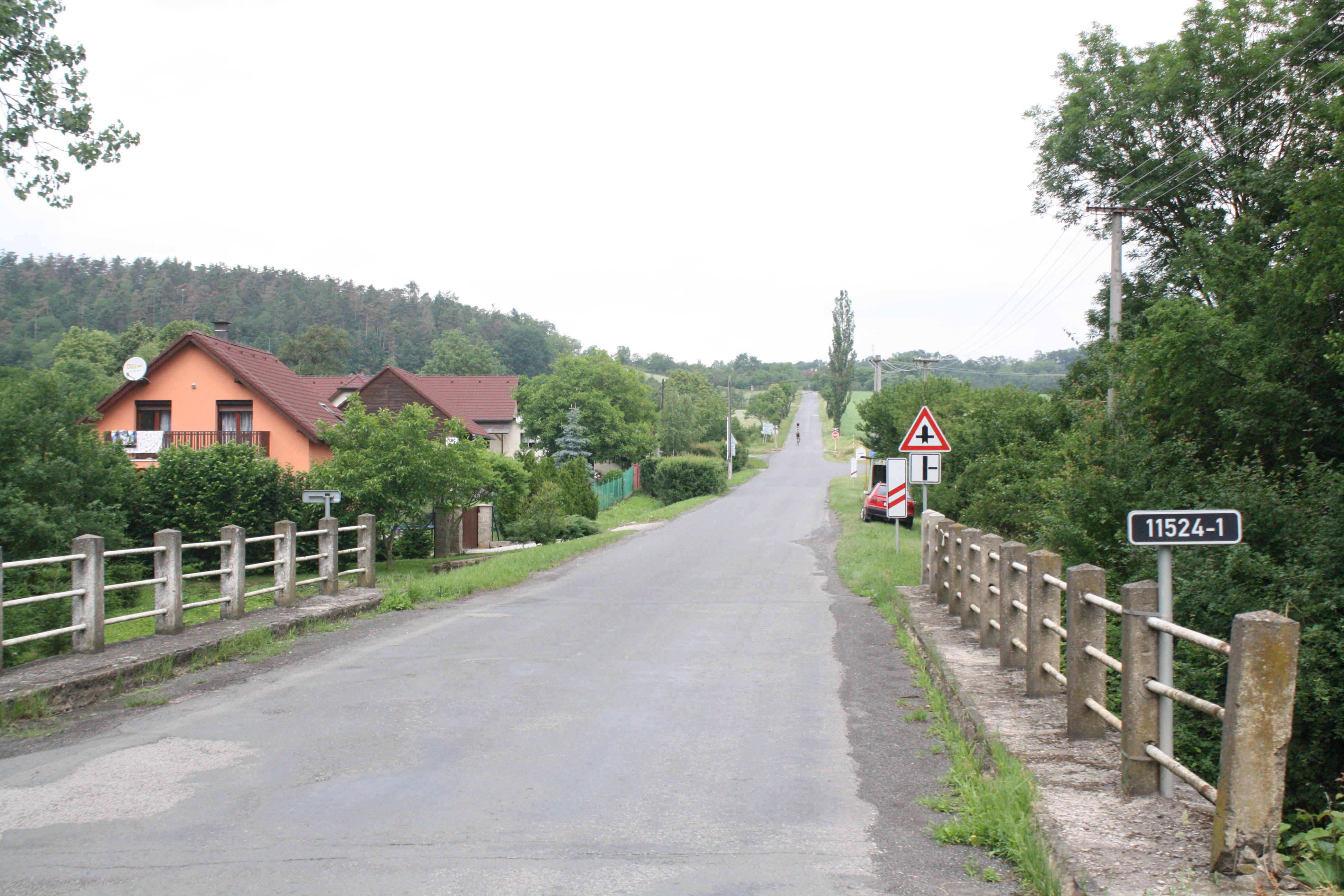 Vesnice Leč, část obce Skuhrov v okrese Beroun.